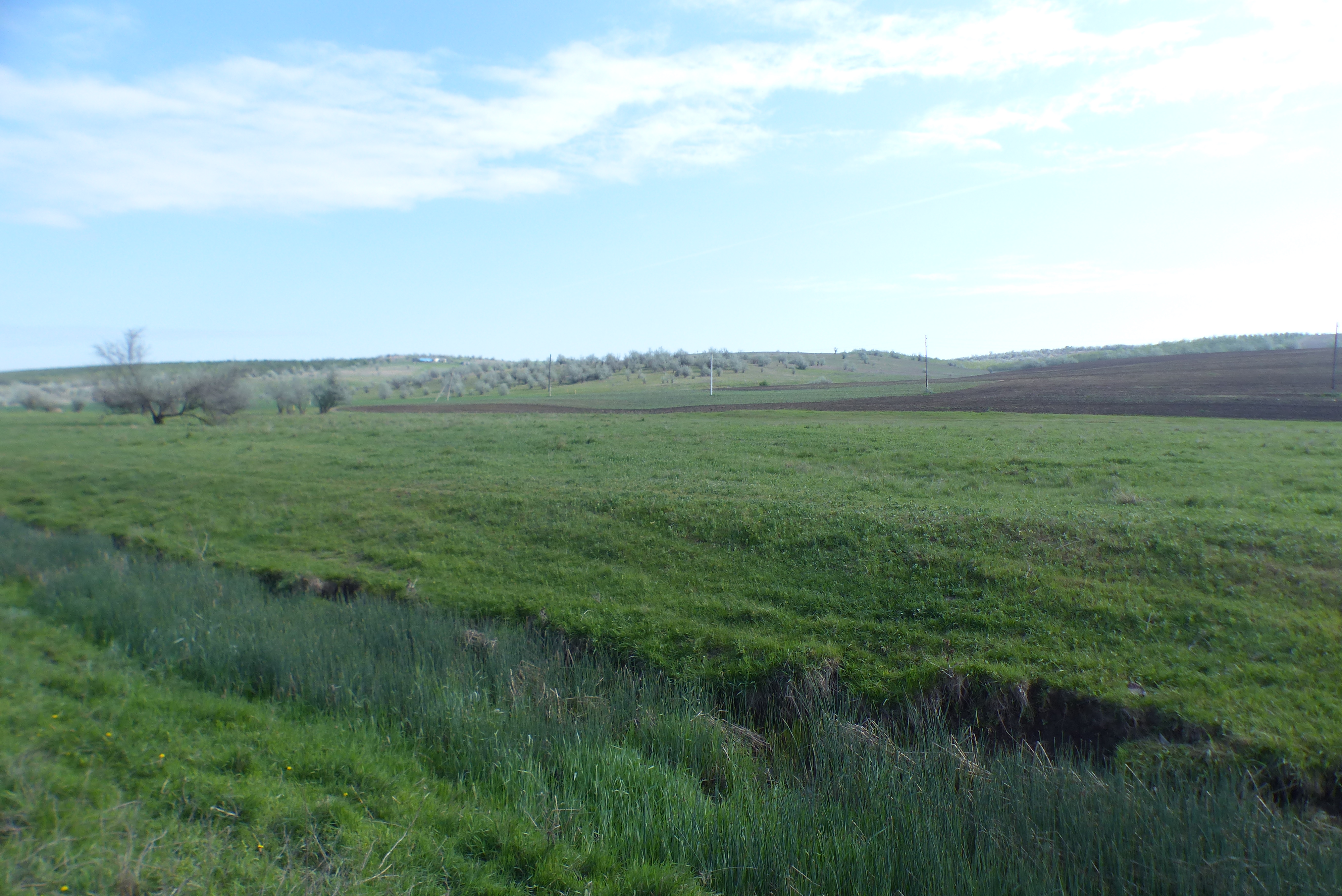 Sector de stepă în nordul Bugeacului, monument al naturii amplasat în Găgăuzia, satul Dezghingea, la 3 km nord de complexul animalier (cod MD-GE-amm.A-002) A-002